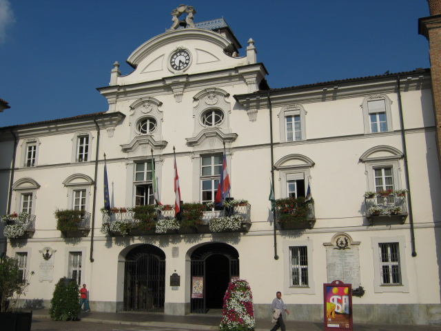 Palazzo Civico This is a photo of a monument which is part of cultural heritage of Italy.